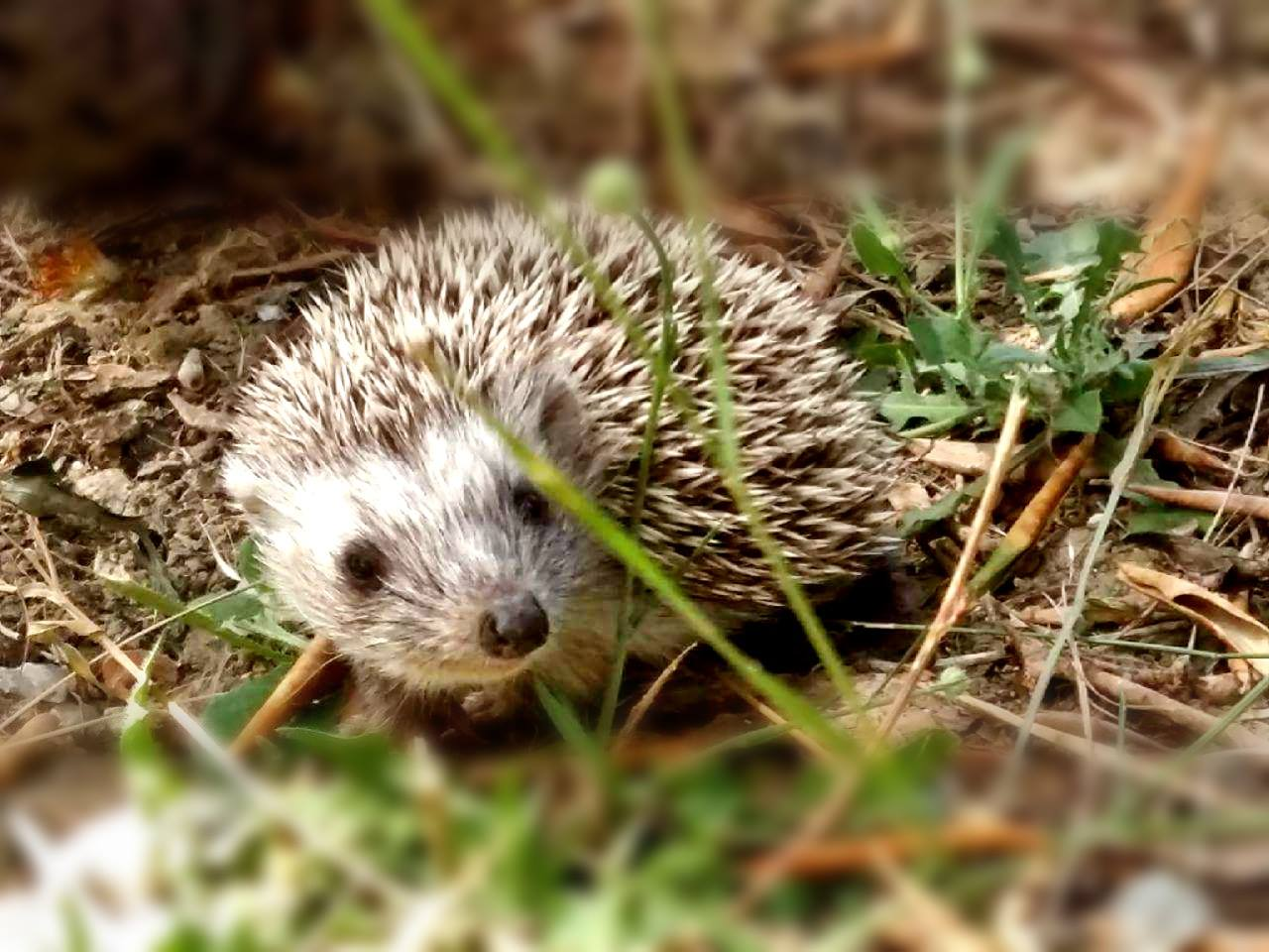 Νεαρός σκατζόχοιρος This is a photography of Natura 2000 protected area with ID GR2210001